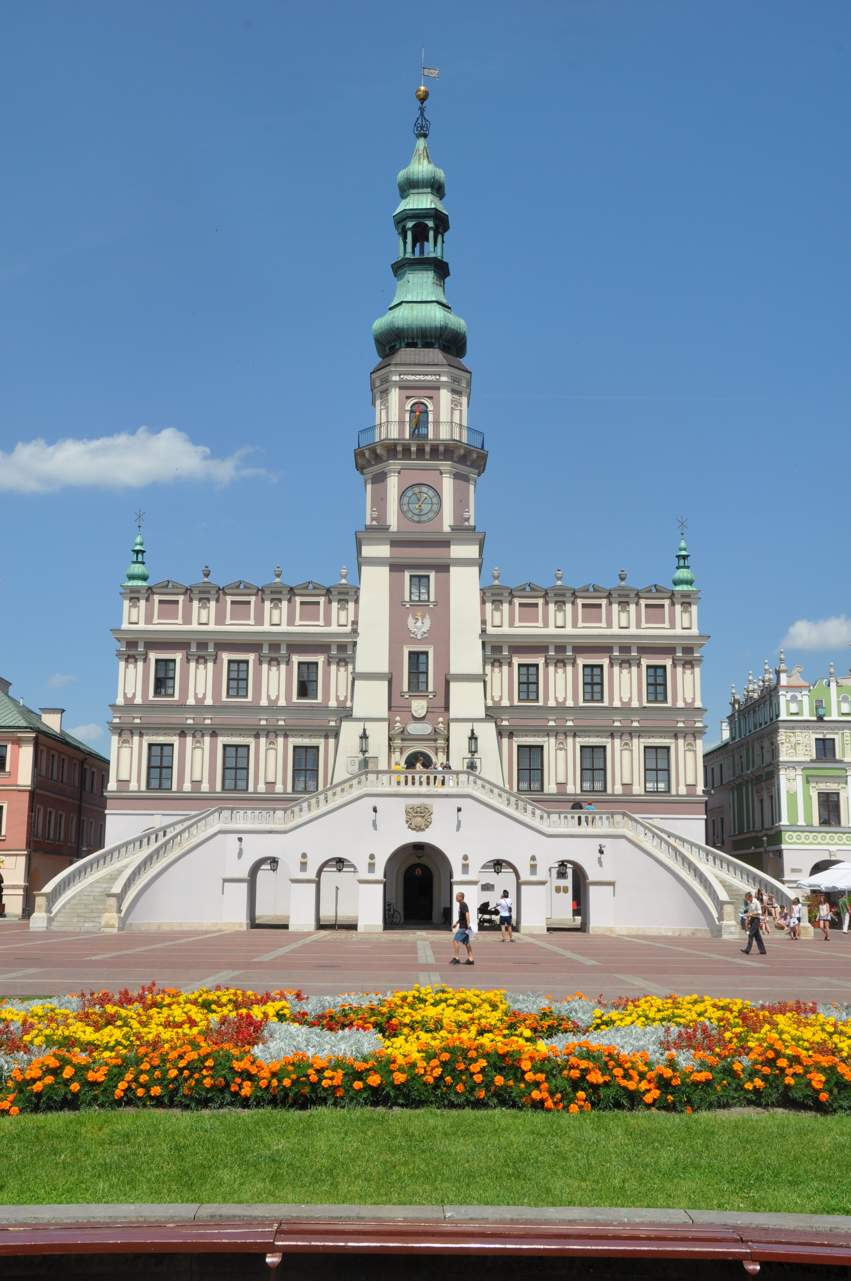 Zamość Ratusz z oficynami (zabytek nr A/294)